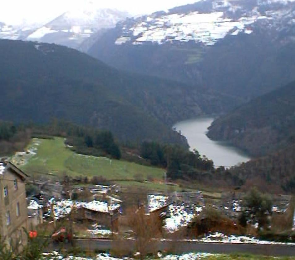 Vista del embalse de Doiras desde Illano, Boal, Asturias. Río Navia